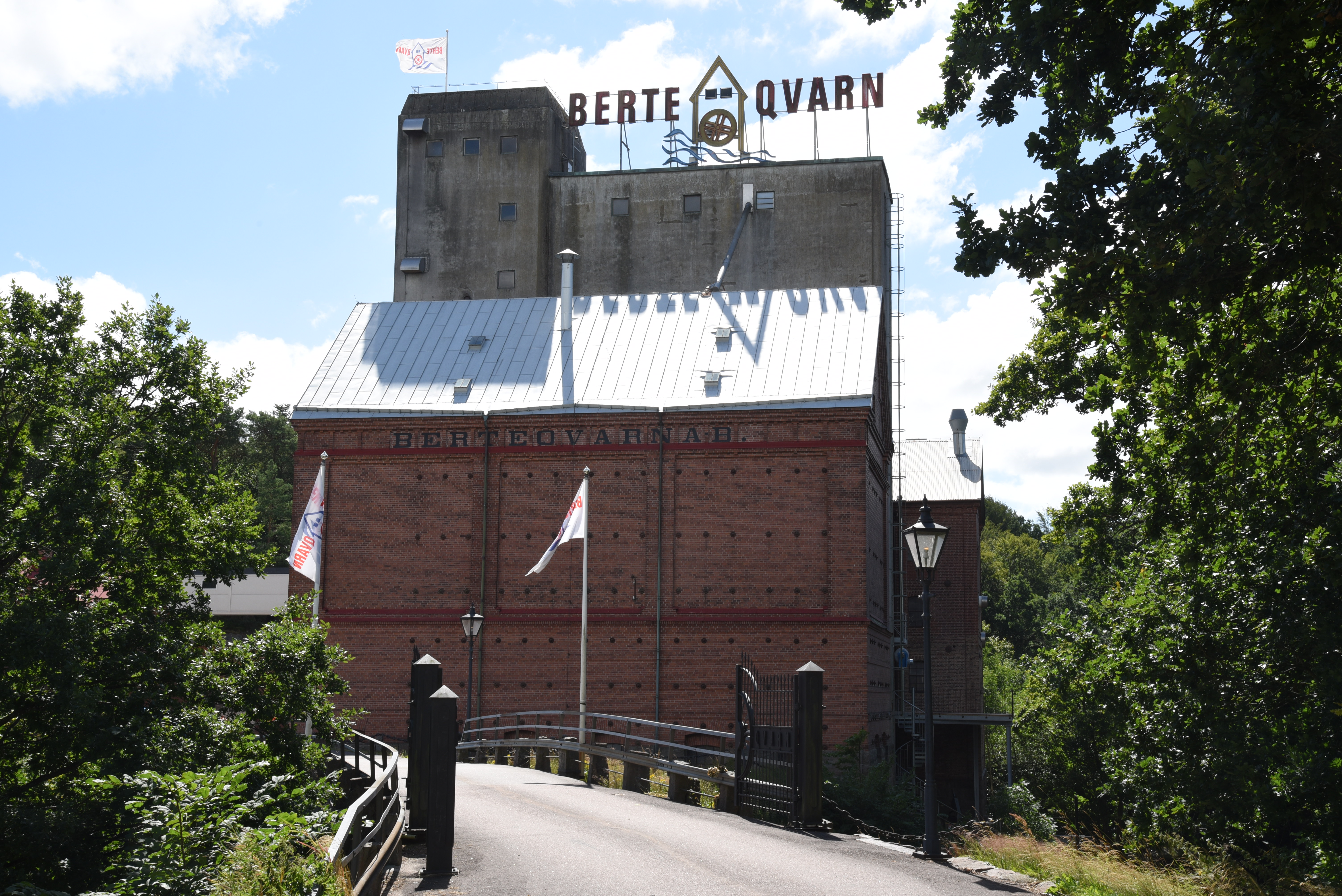 Berte Qvarn i Slöinge.